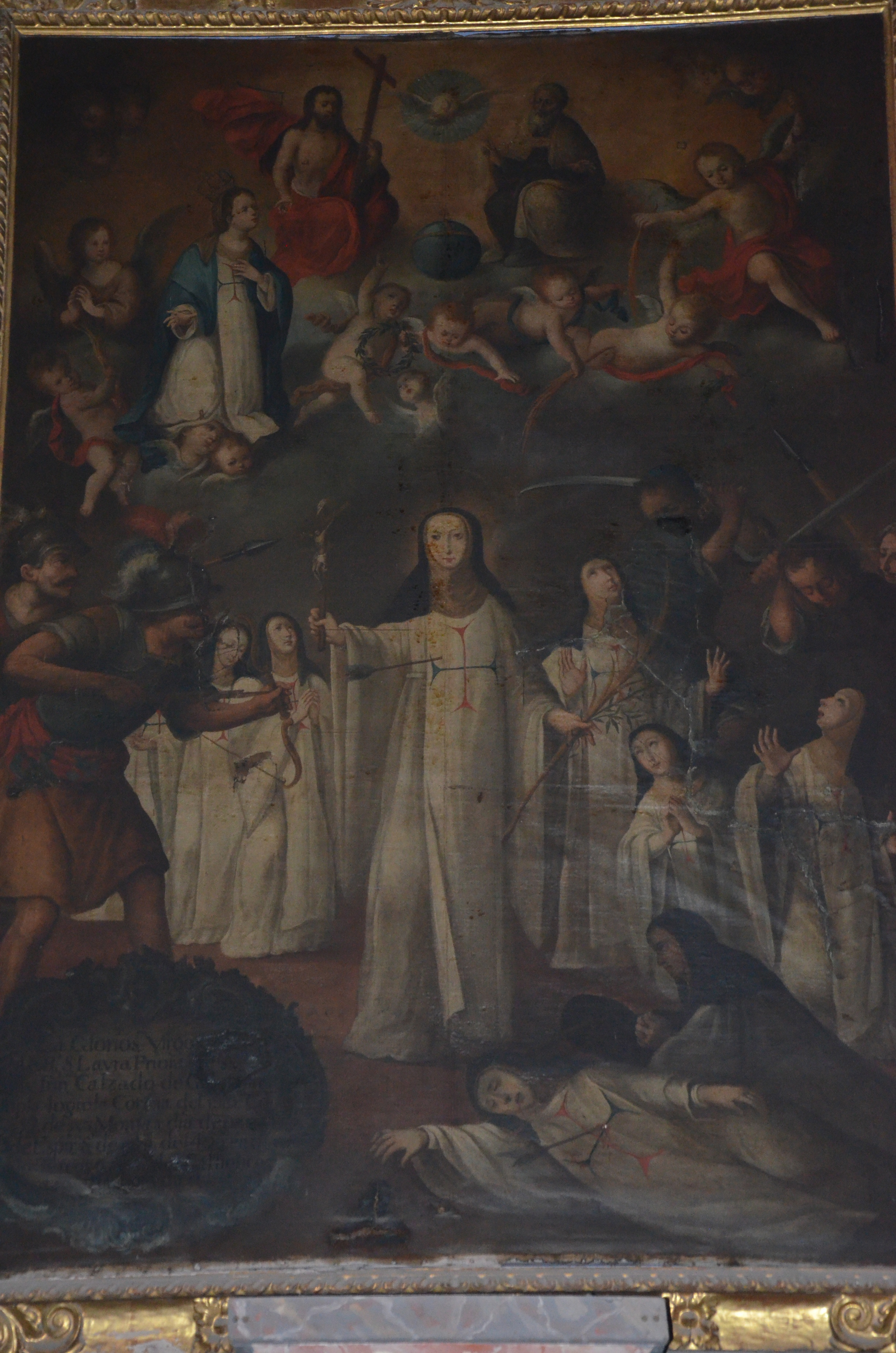 Cuadro de grandes dimensiones que se conserva en la iglesia de Ntra. Sra. de Gracia de los Trinitarios en Córdoba (España)